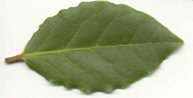 Foto escaneada